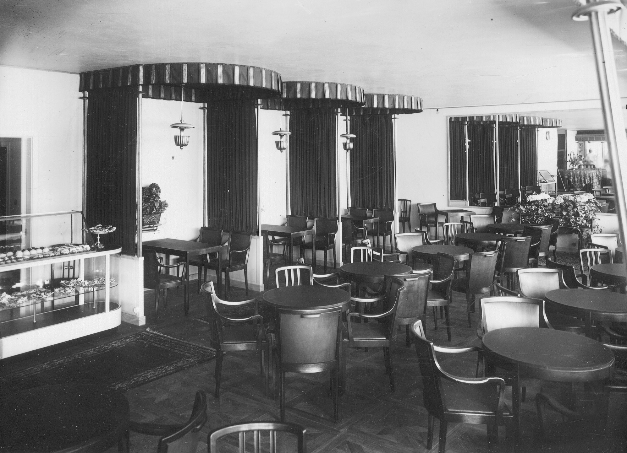 Hovkonditoriet Landelius i "Centrumhuset" Kungsgatan 36